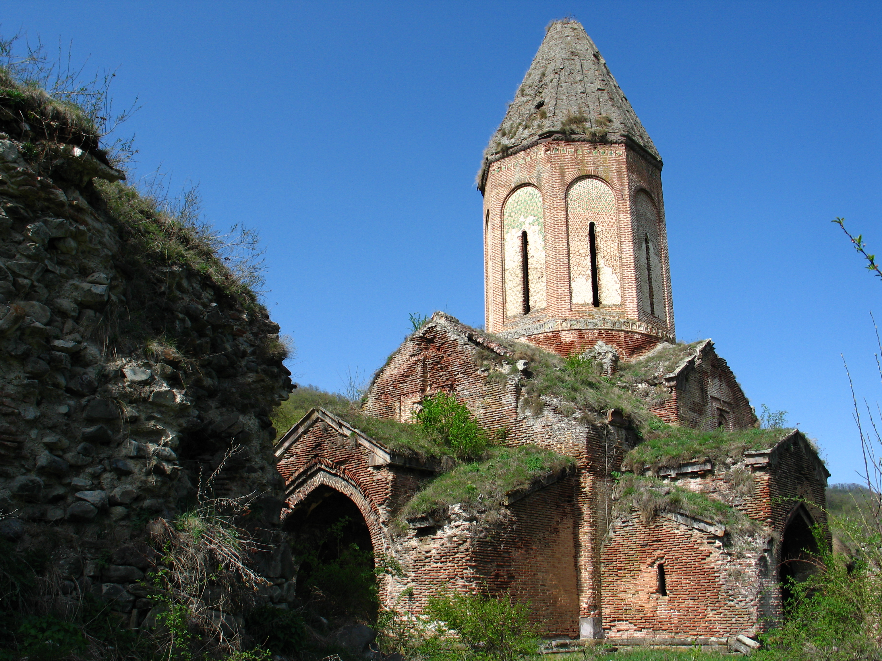 Վանական համալիր «Կիրանց» 39/11